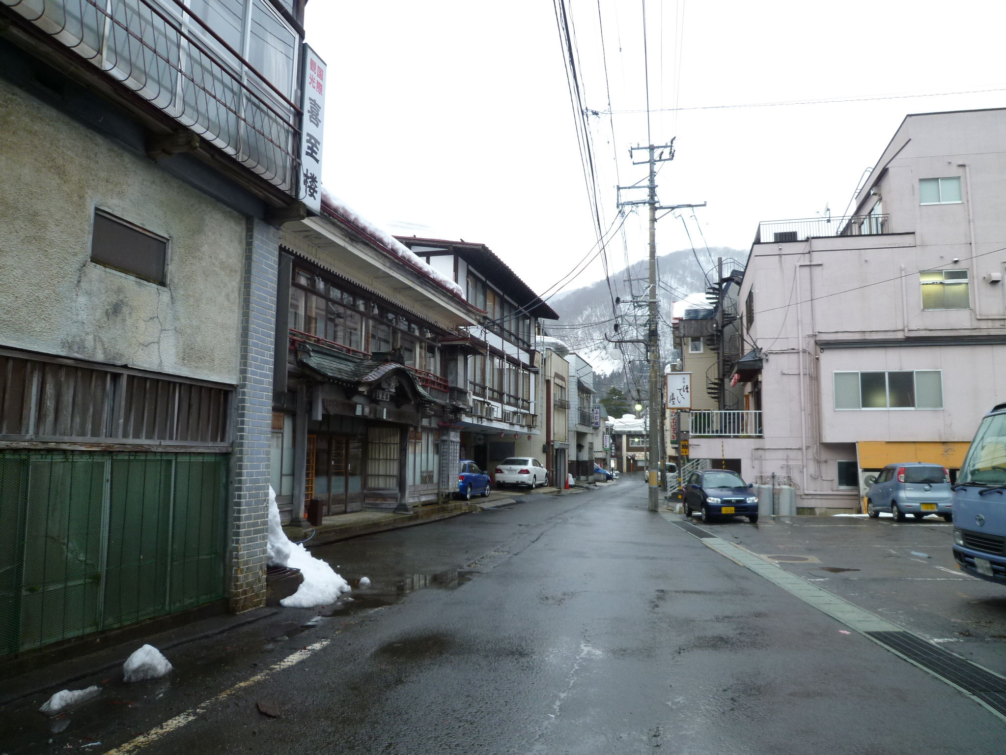 瀬見温泉。山形県最上町大堀。温泉街の通りを撮影。